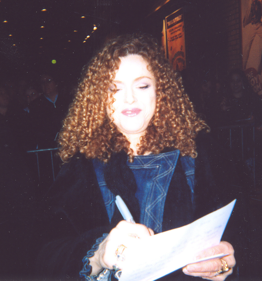 Bernadette Peters in Shubert Alley, NY